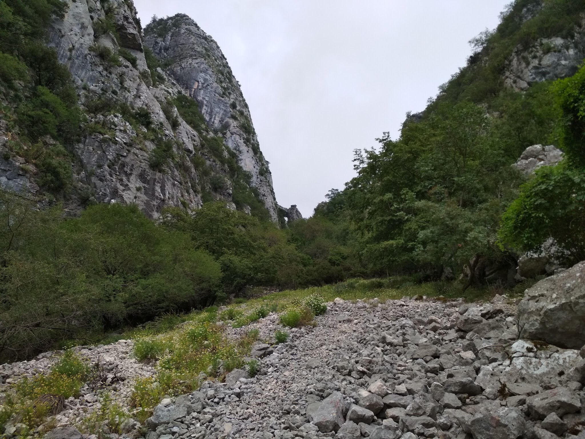 A part of Kotor Vertical Extreme track